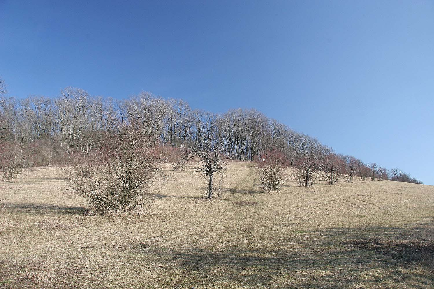 Chotuc - svědecký vrch, district Nymburk autor:Prazak date: 17. 2. 2007